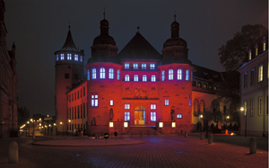 Museumsfront des Historischen Museums der Pfalz Speyer mit Lichtinstallation "Rot Blau" von Michael Seyl aus dem Jahre 1998